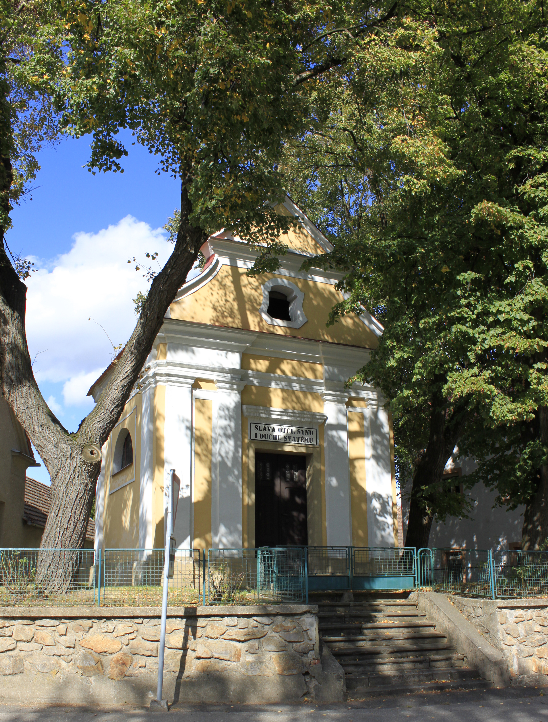 Dukovany, okres Třebíč. Kaple Nejsvětější Trojice z roku 1689.